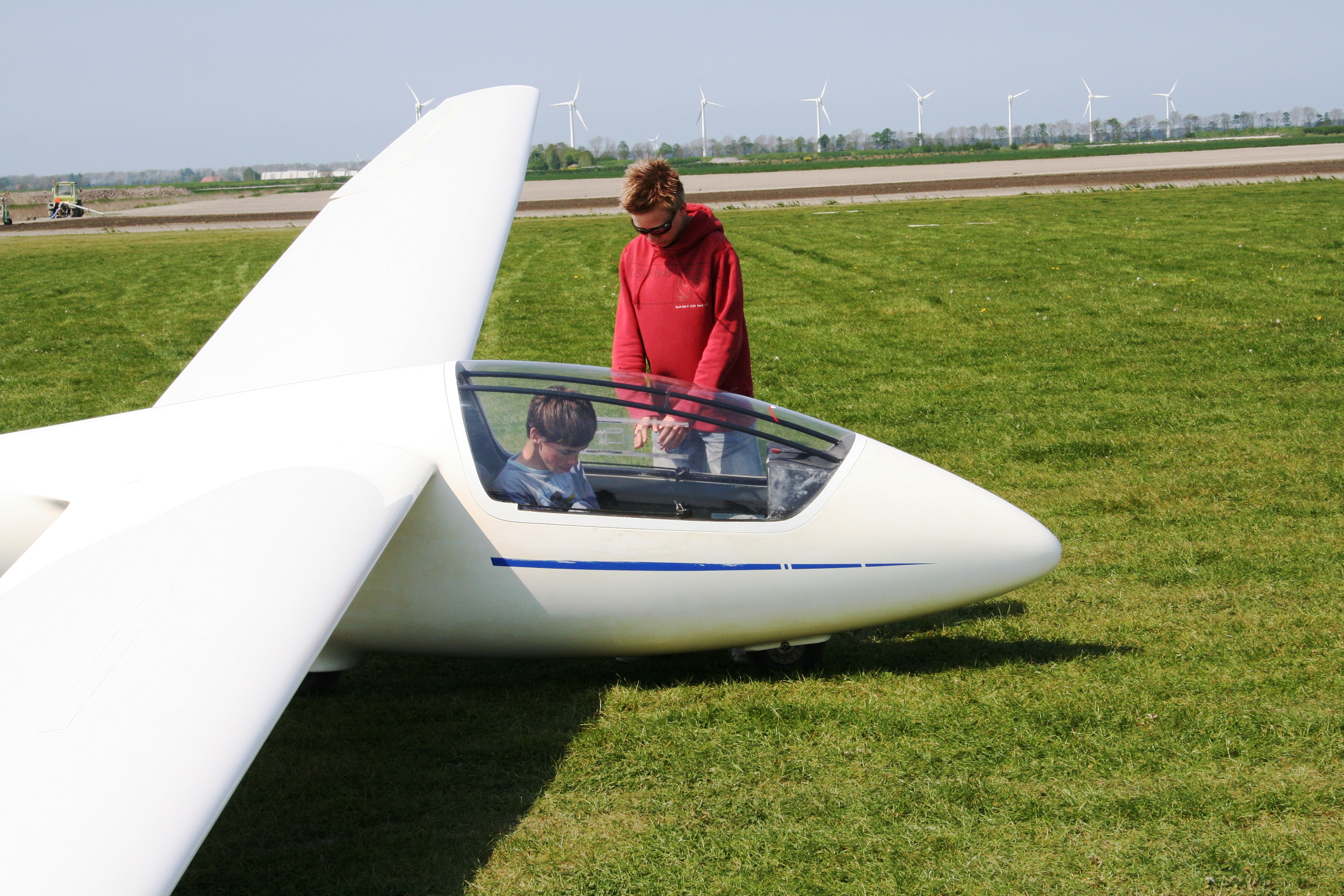 Solist in een ask 23 zelfgemaakt op de Zweefclub.